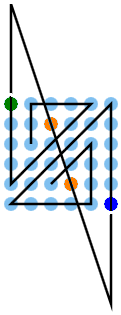 Konstruktion einer Lösung ohne doppelte Punkte für das n x n Punkte Problem.